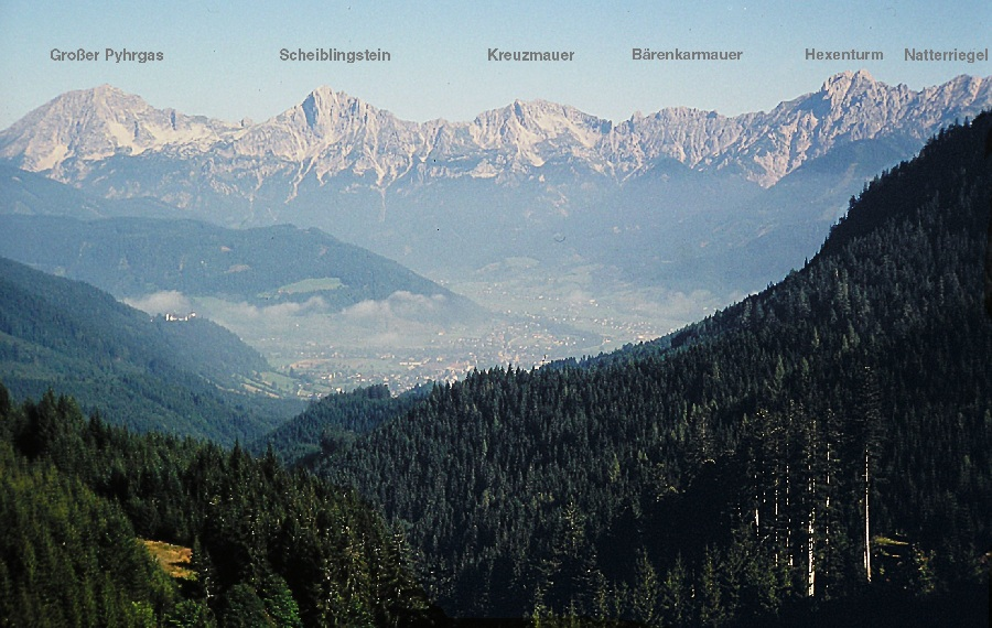 thumb|right|Variation (Original text: Blick über Admont auf die Haller Mauern)